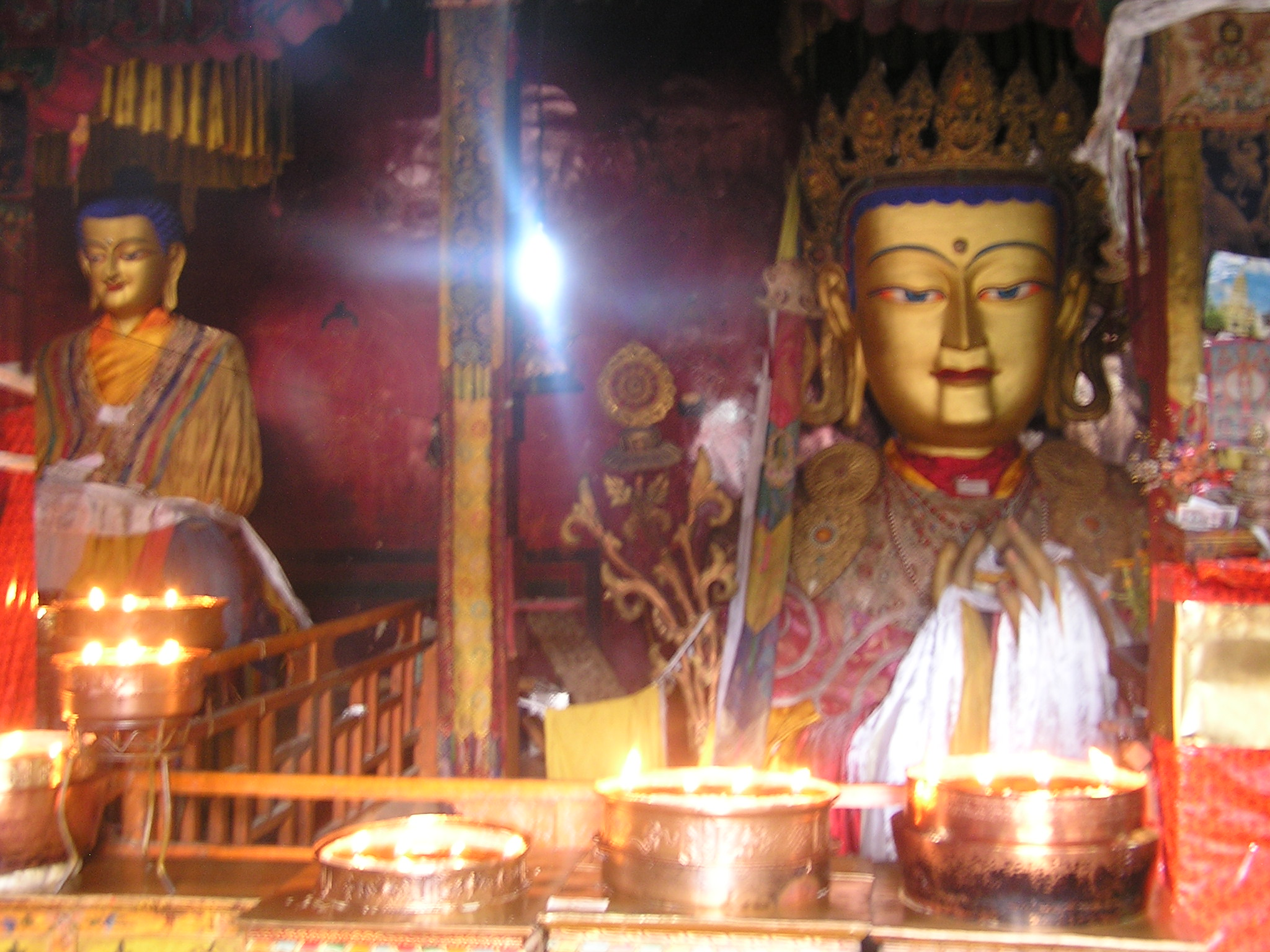 Lhasa 2.